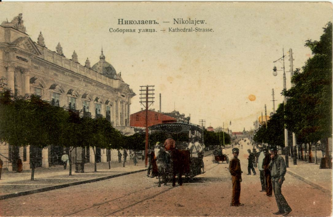 „Nikolajew. Kathedral-Strasse.“